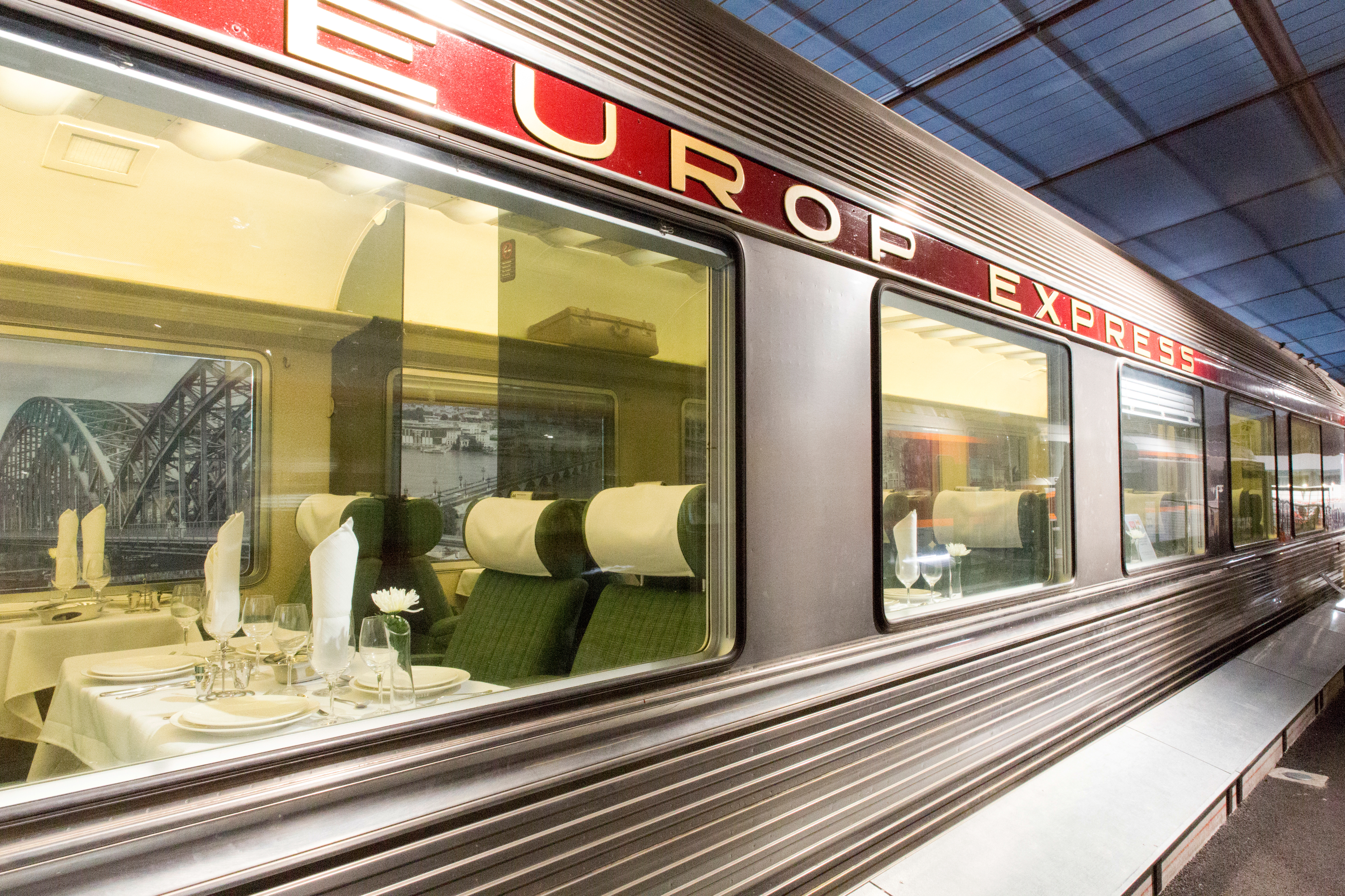 Table dressée dans une voiture-salon TEE Mistral 1969 A8tuj.